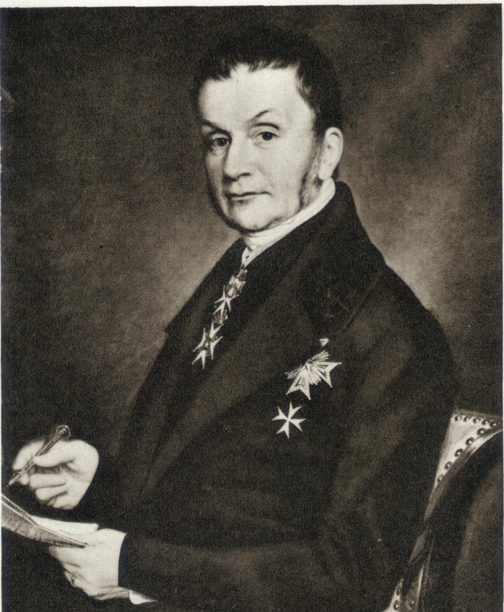 Jakob August Hartmansdorff (1792-1856), riksdagsman, statssekreterare mm.title QS:P1476,sv:"Jakob August Hartmansdorff (1792-1856), riksdagsman, statssekreterare mm."